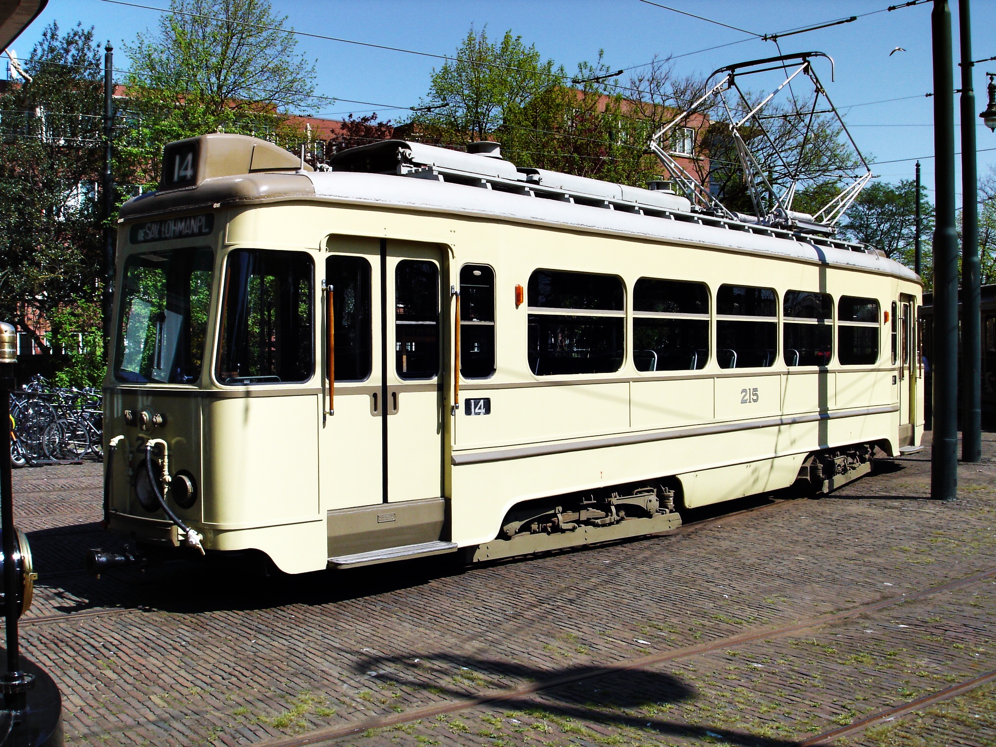 HTM museumtram/museum streetcar